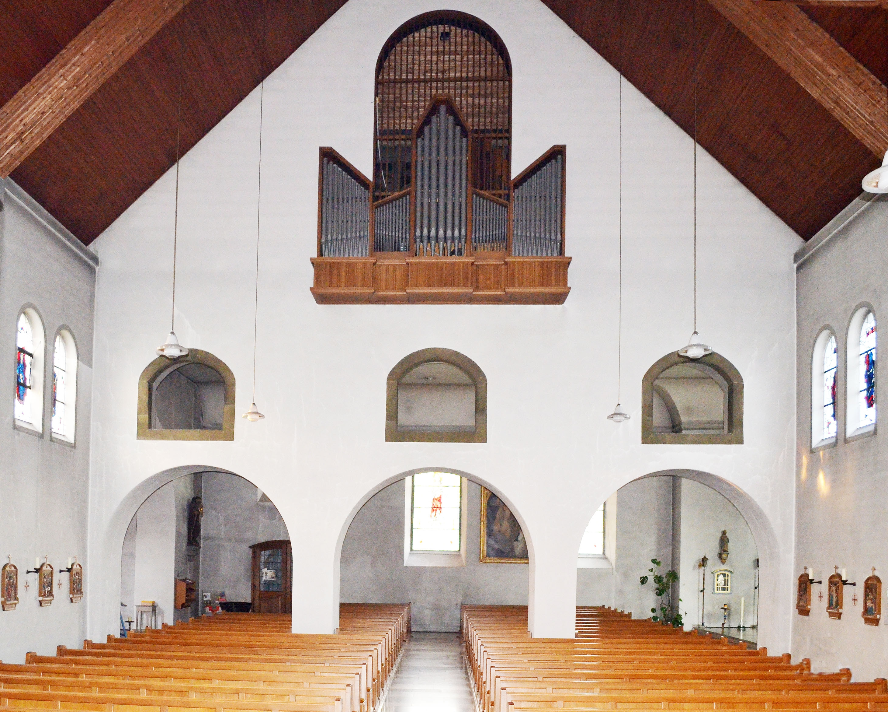 Alme, St. Ludgerus, Trennwand zwischen alten Teil und Anbau